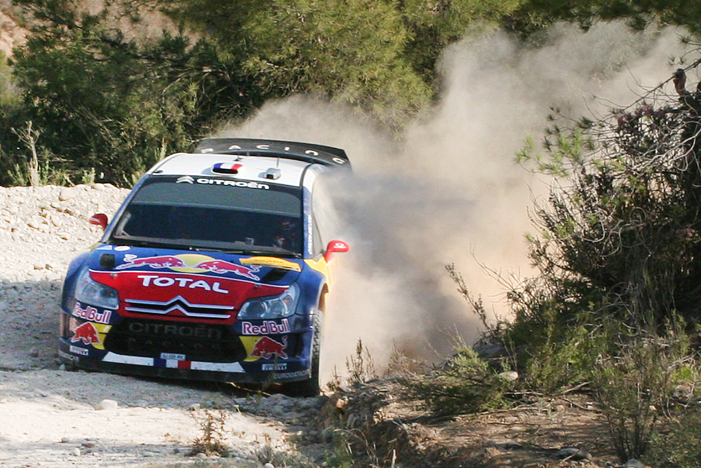 CITROËN TOTAL WRT Rally Catalunya - Costa Daurada 2010